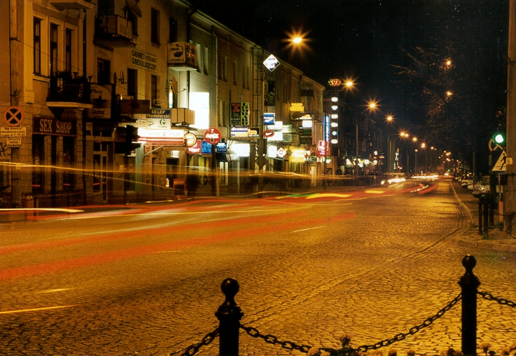 Bjalistoko, la strato Lipowa nokte.